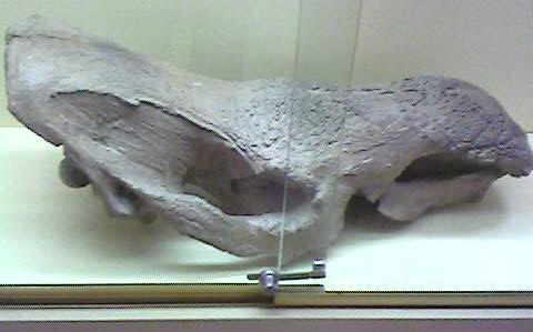 Coelodonta antiquitatis skull, from the Institut de Paleontologia Miquel Crusafont